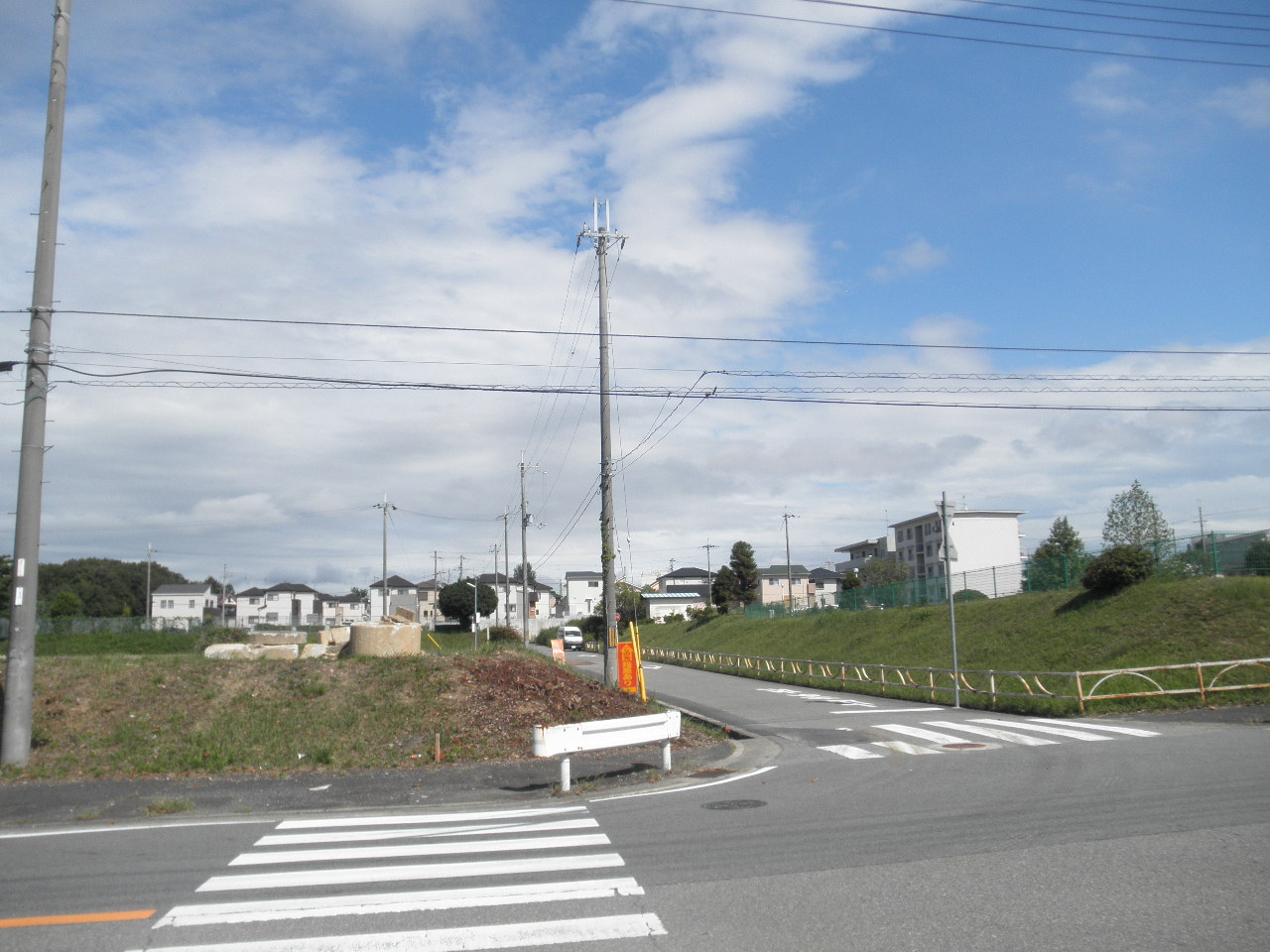 三木市別所町巴